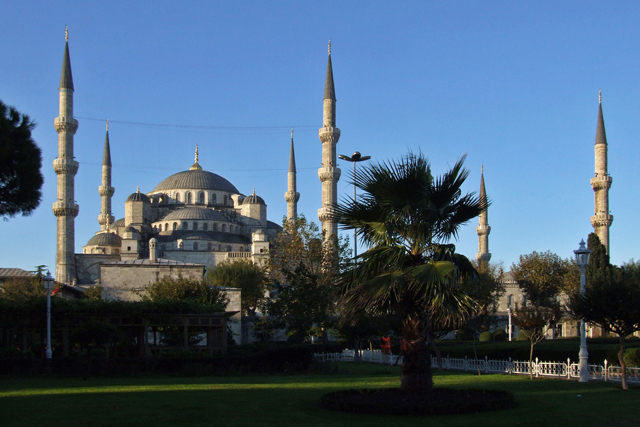 Sultan Ahmed Mosque